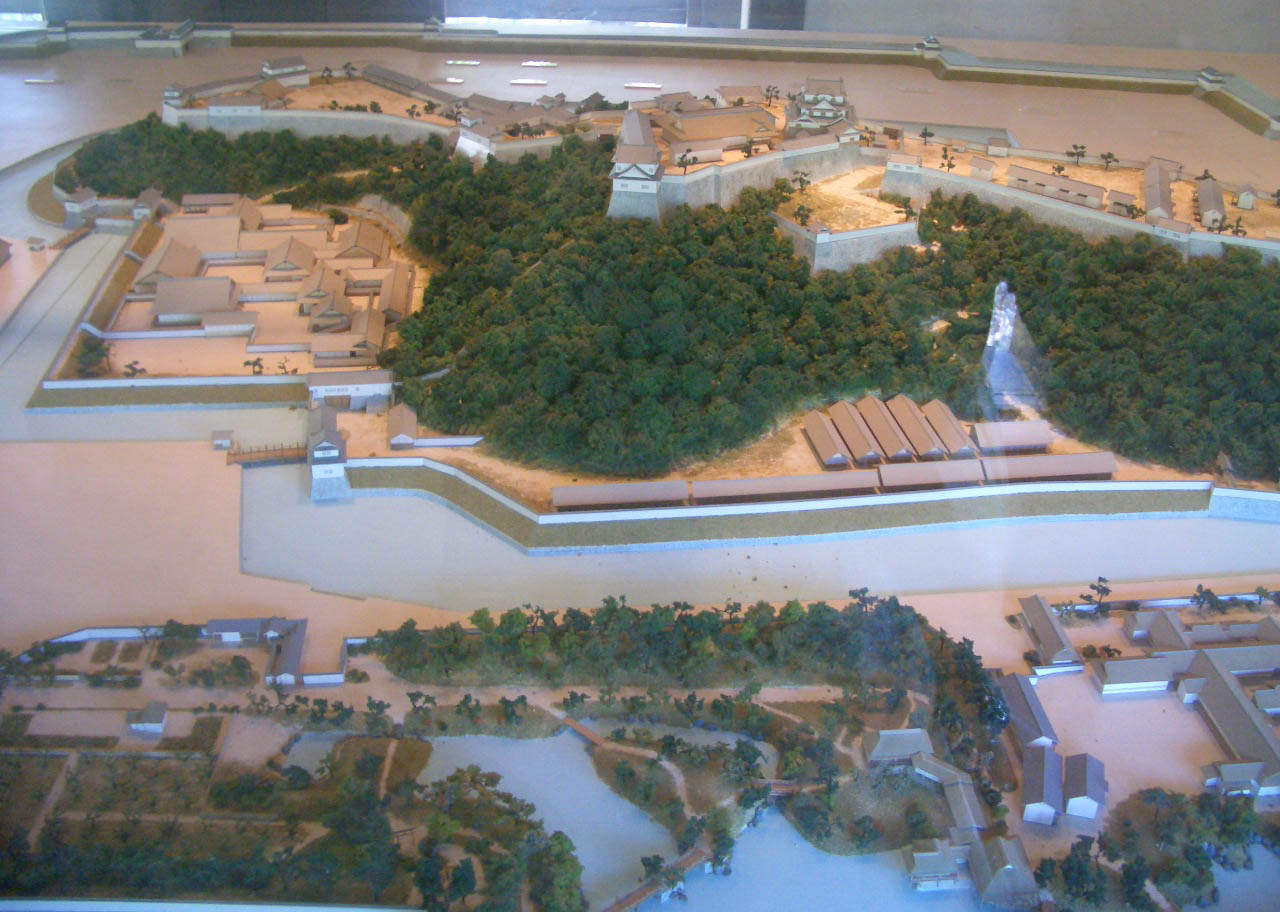 彦根城の復元模型